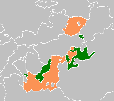 De Reussische landen in 1820 Oranje de jongere linie (verdeeld in Schleiz, Ebdersdorf en Lobenstein), groen de oudere linie